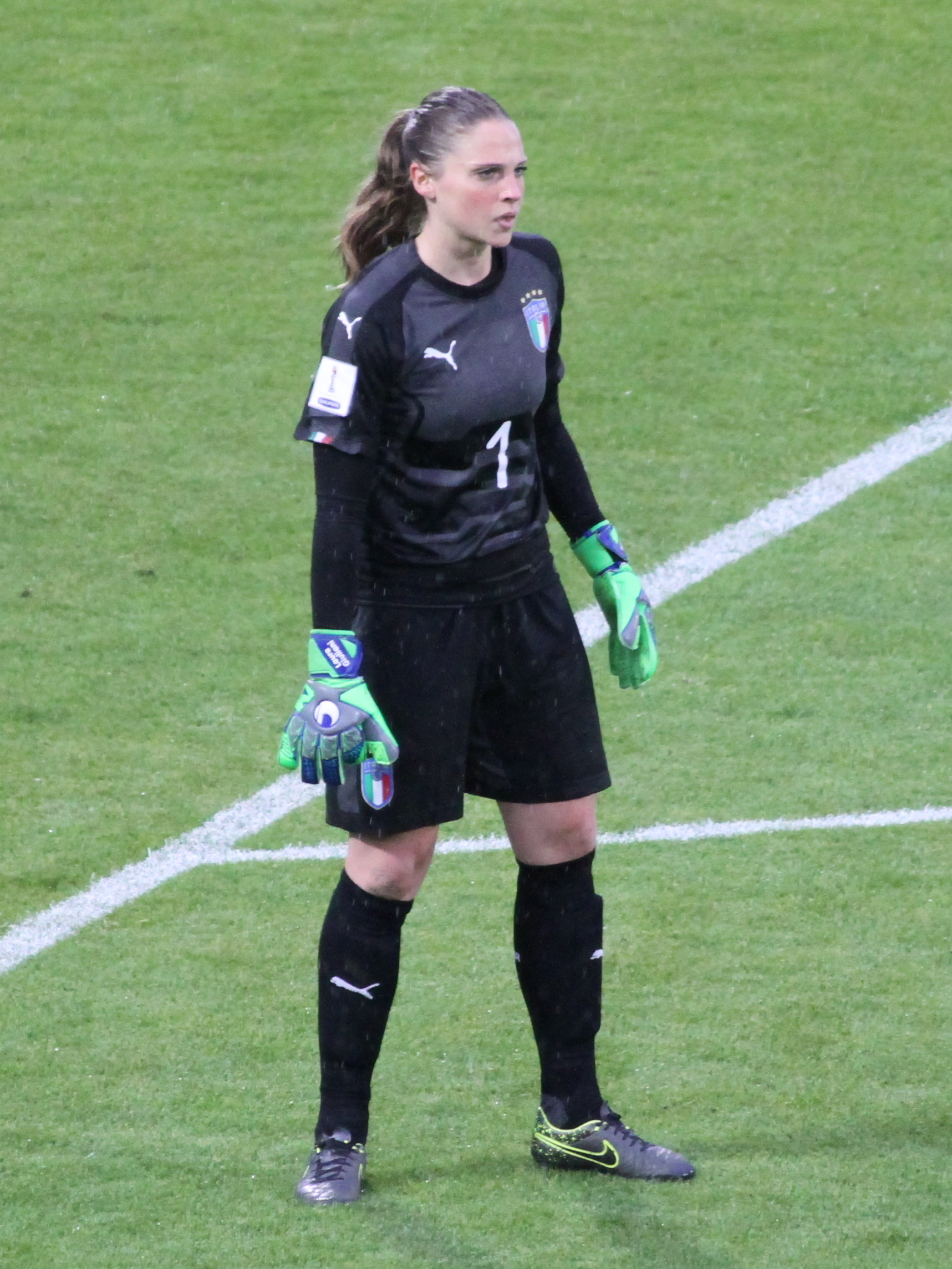 Laura Giuliani, portiere della nazionale di calcio femminile dell'Italia, durante l'incontro Italia-Belgio del 10 aprile 2018 allo stadio Paolo Mazza di Ferrara.